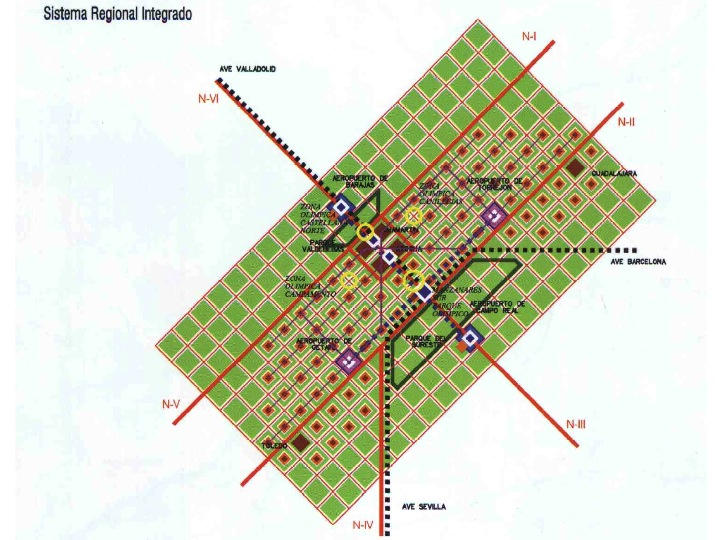 Madrid Metropolitan Structural Form